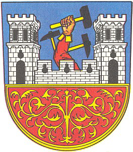 Kašperské Hory (znak)